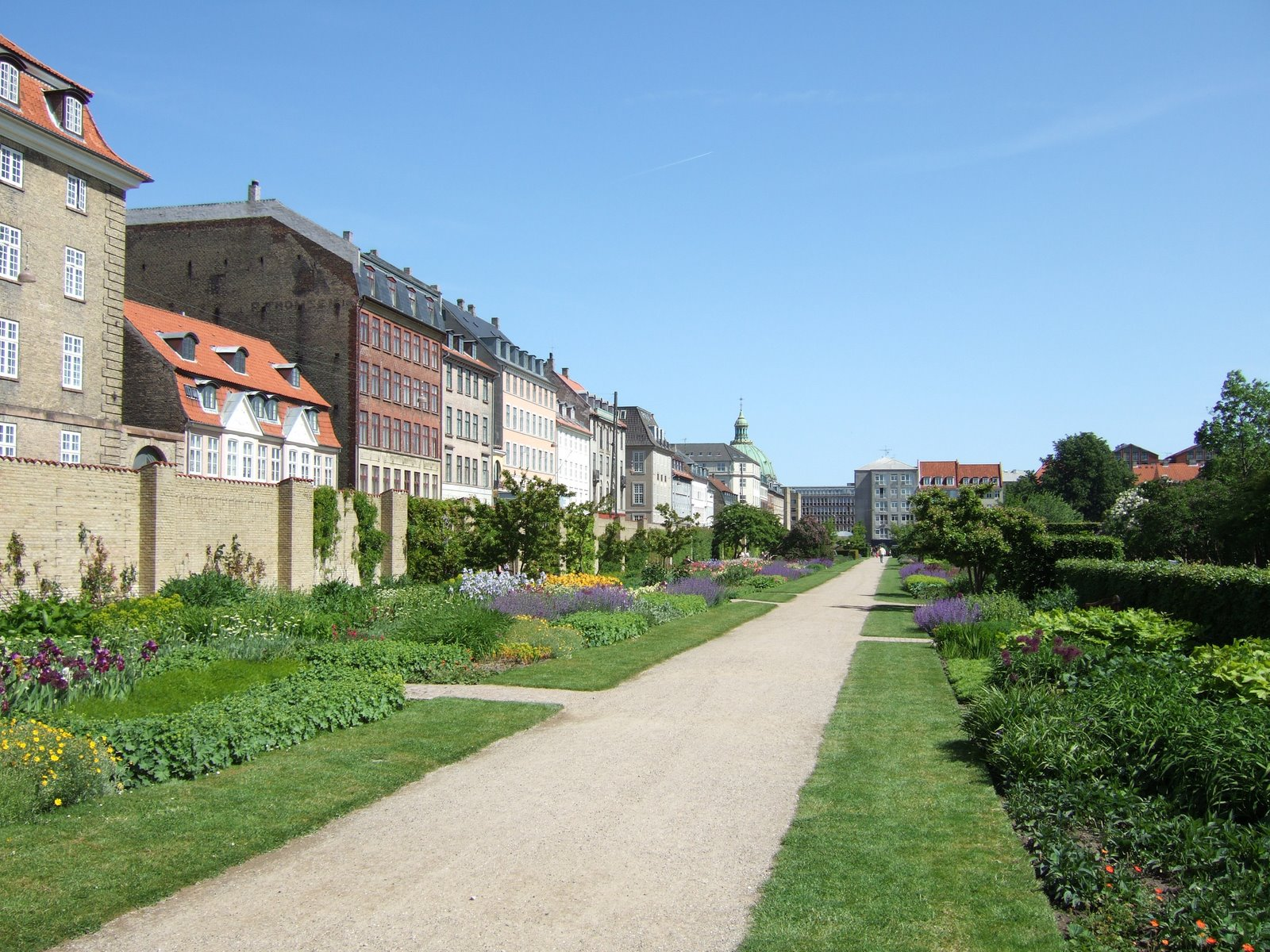 Schitterend weer in Kopenhagen.